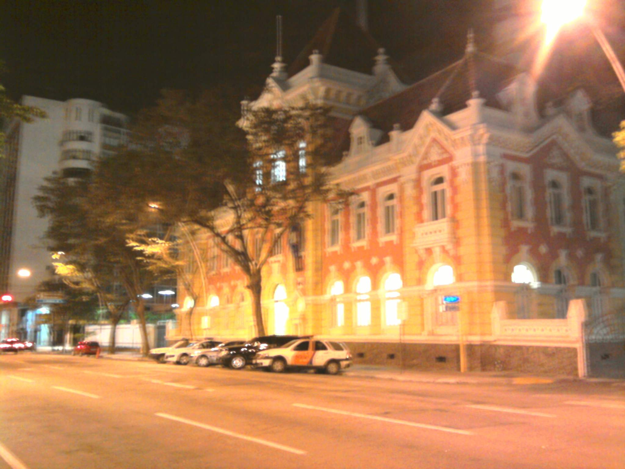 Antiga sede da Chefatura da Polícia do Rio de Janeiro, situada na Praça da República em Niterói. Atualmente abriga a 76 DP.